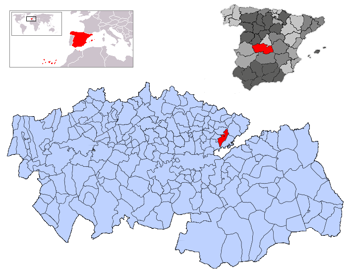 Alameda de la Sagra en la provincia de Toledo